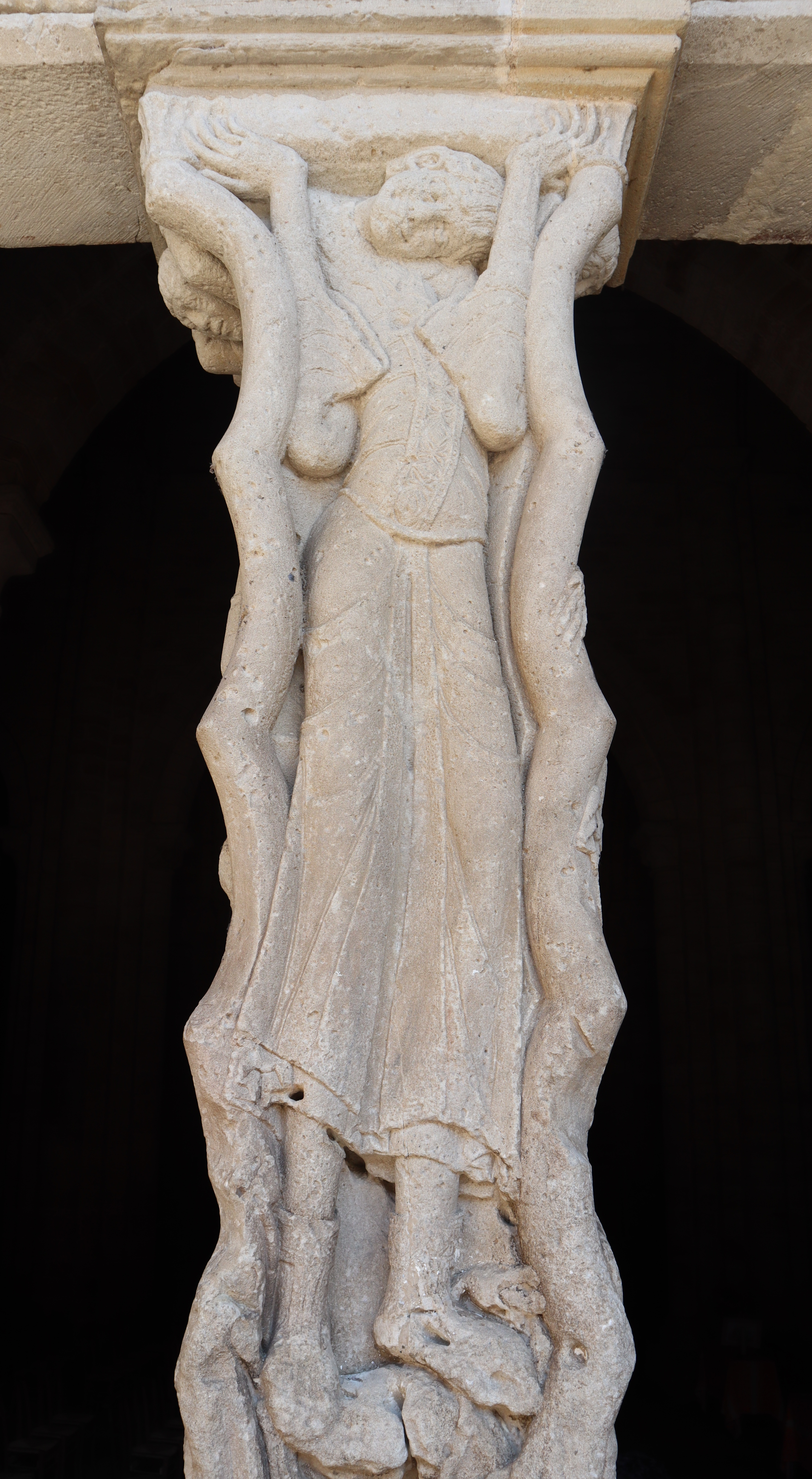 Trumeau du portail méridional de l'abbatiale Saint-Pierre de Beaulieu-sur-Dordogne (19) illustrant les trois ages de la vie humaine. Détail de la partie centrale: la fleur de l'âge.